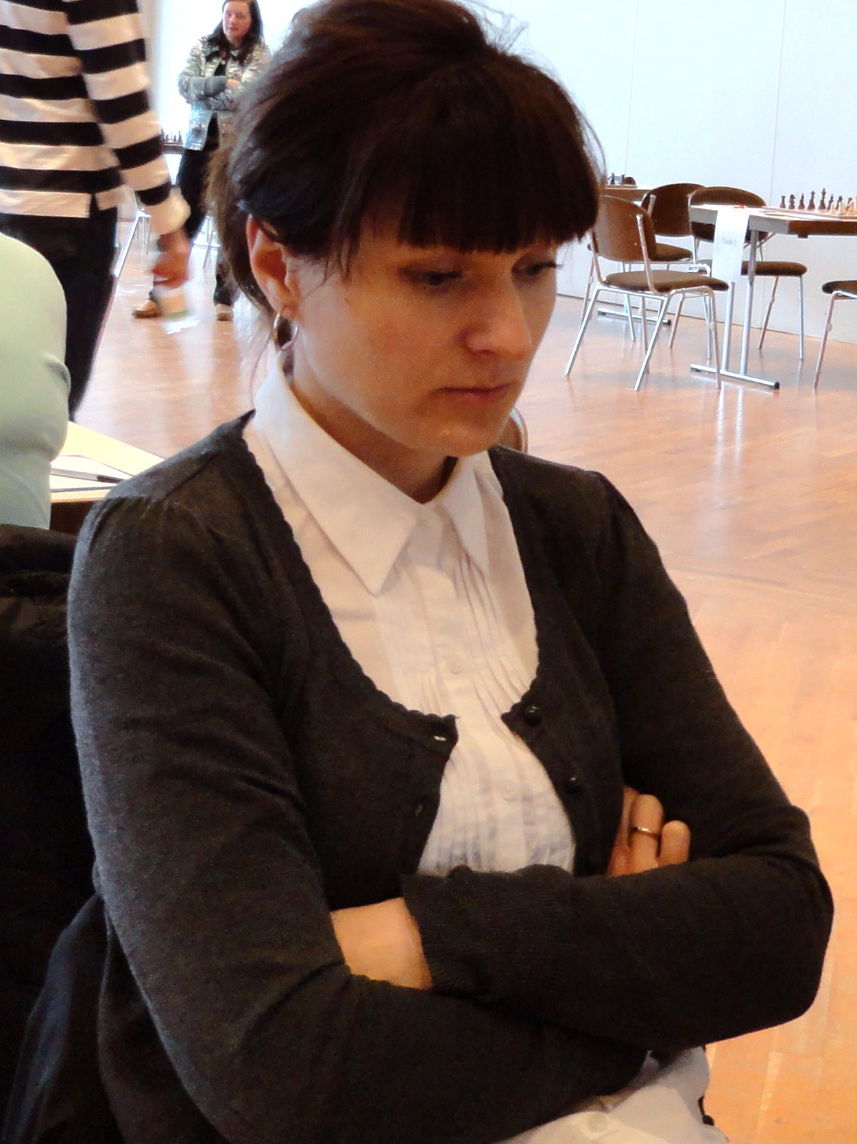 Tatiana Kononenko, Finalrunden der Schachbundesliga der Frauen, Saison 2011/12 in Gladenbach.